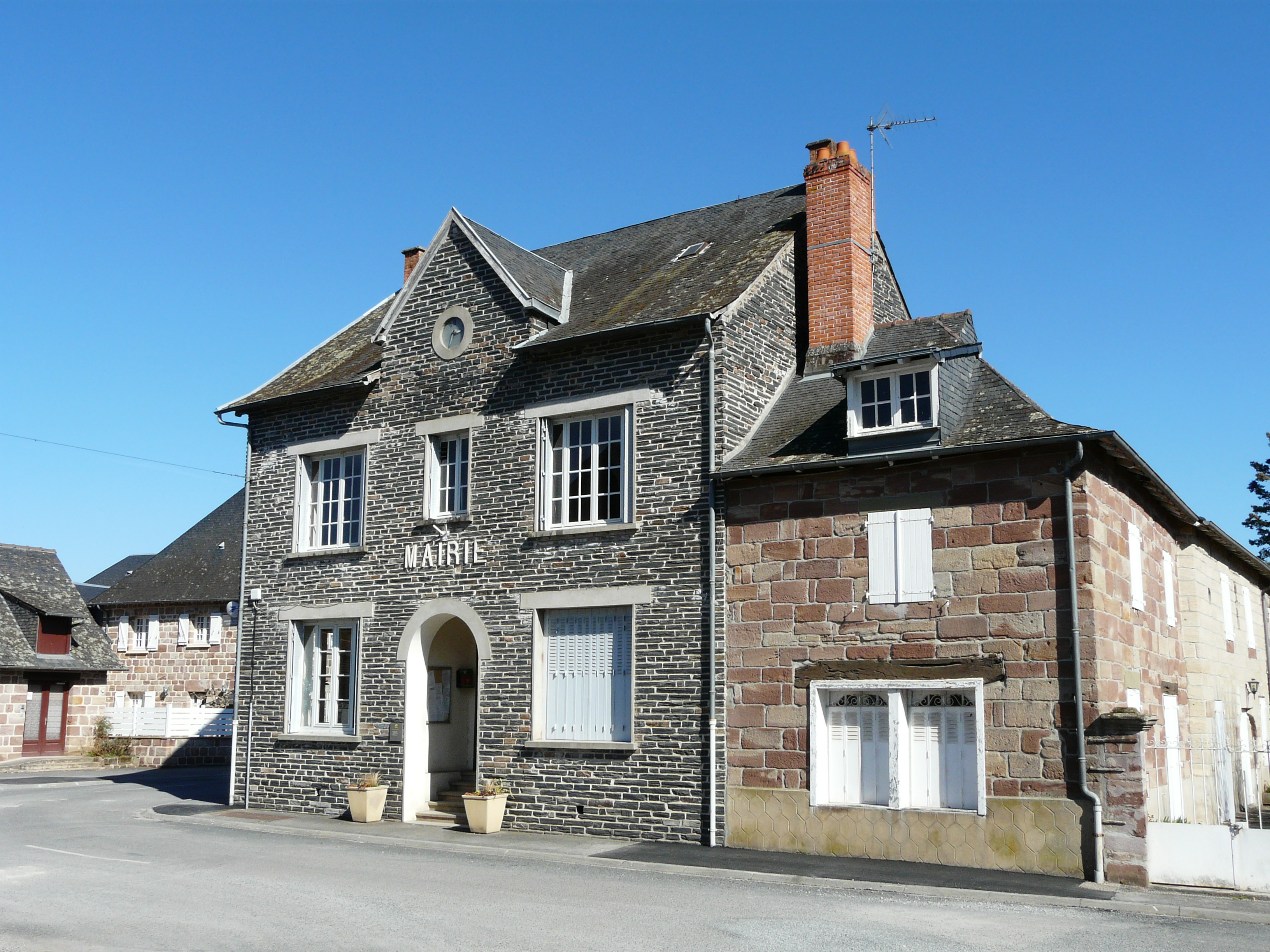 La Mairie de Saint-Viance, Corrèze, France.